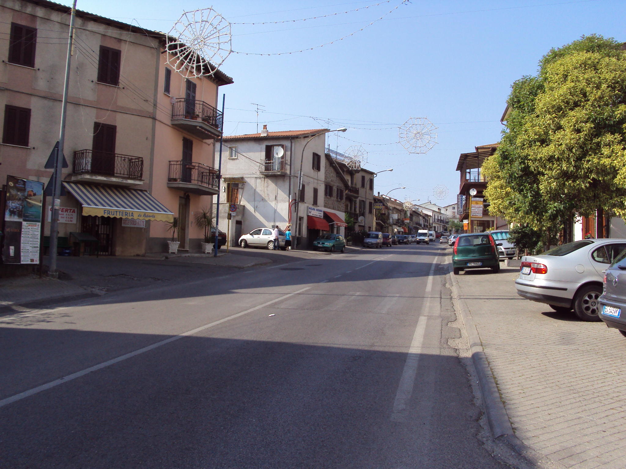 Interlingua: La via Cassia a Zepponami, frazione di Montefiascone.